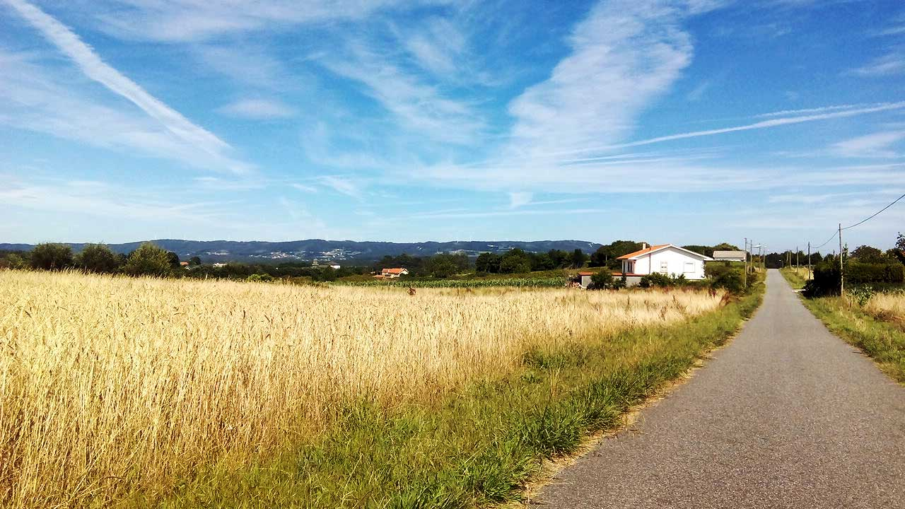 Vista do Castro, O Val.